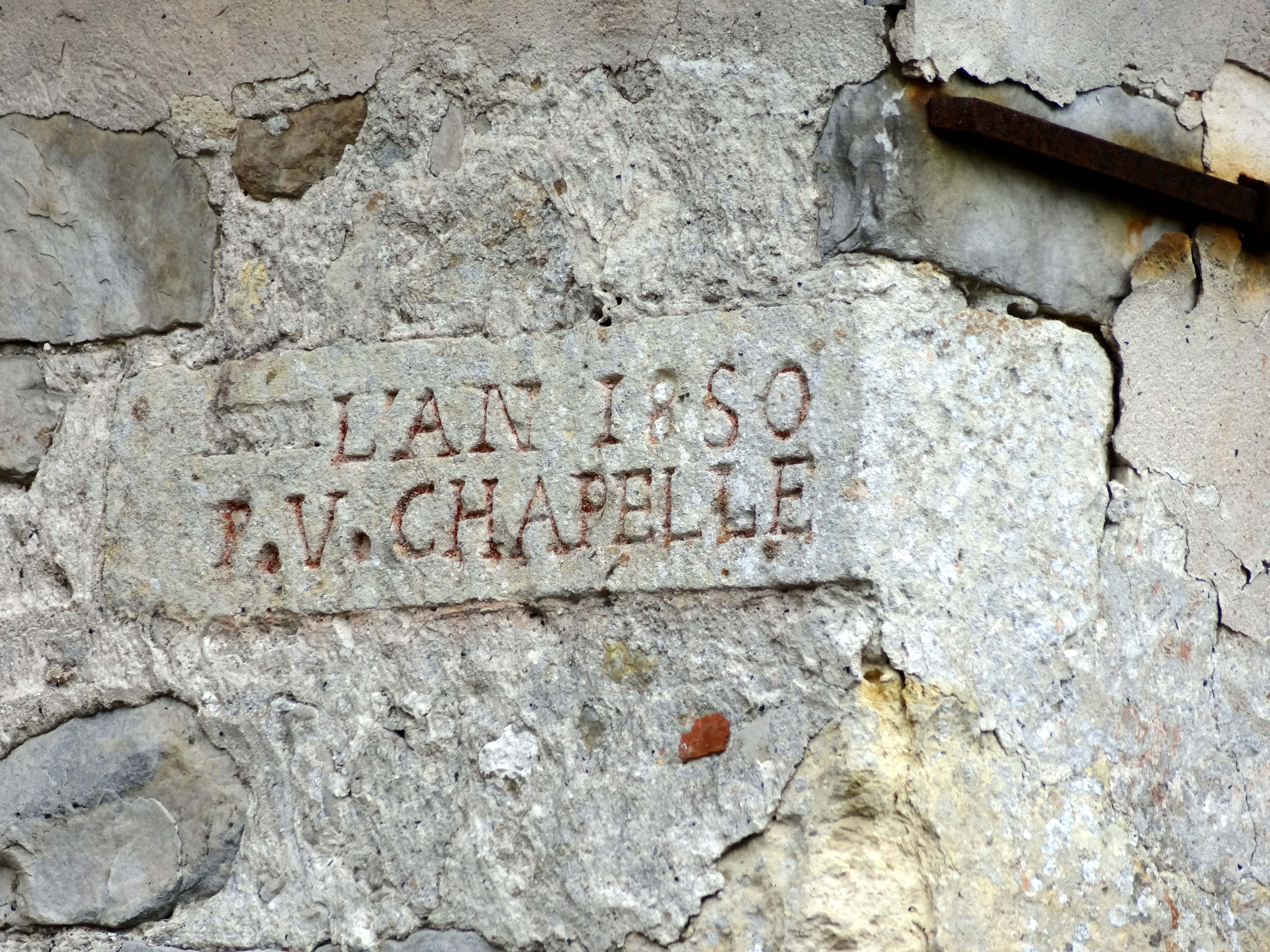 Église Saint-Pierre et Saint-Paul de Bouillancy - voir titre.